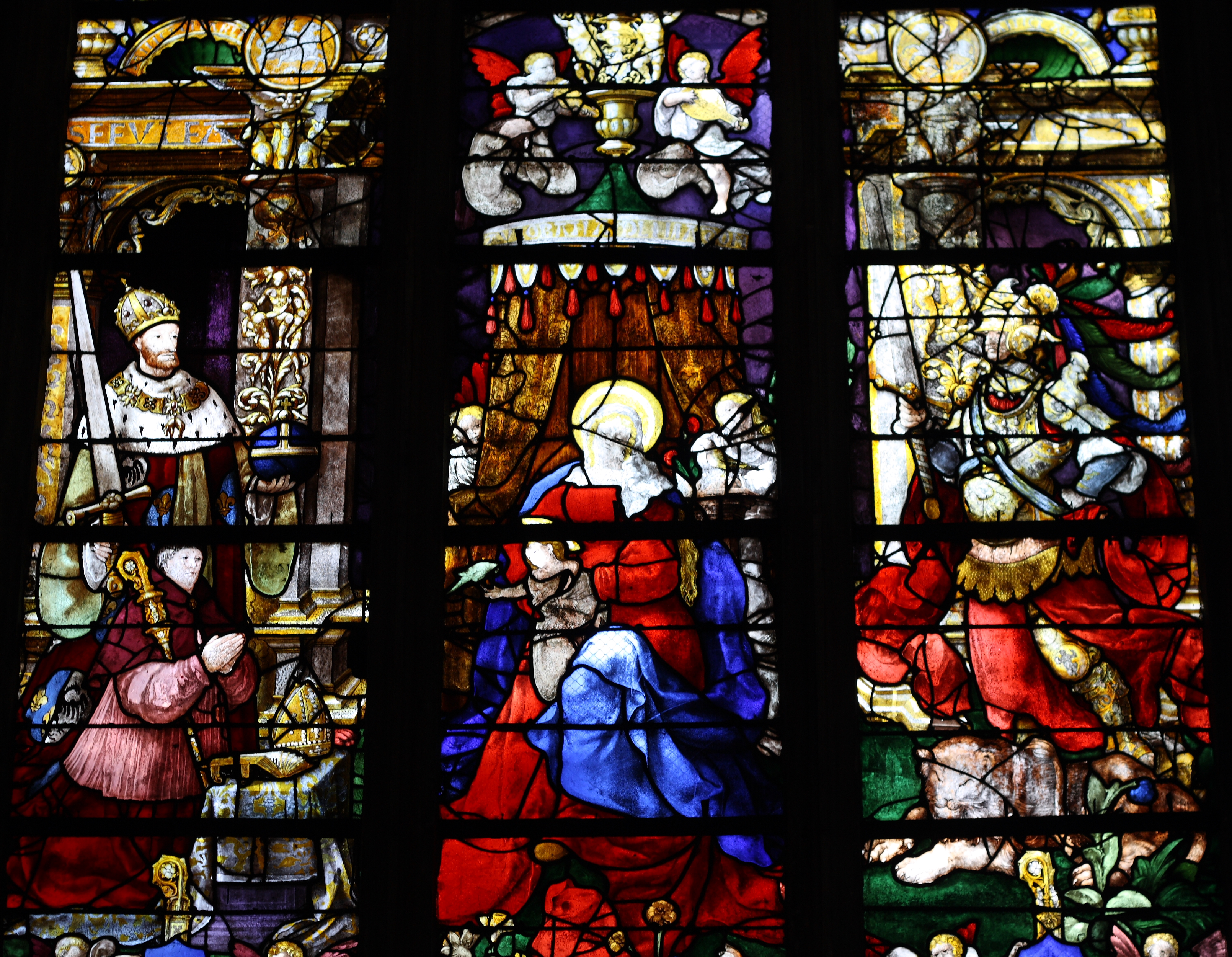 Ausschnitt des Bleiglasfensters Nr. 7 (16. Jahrhundert) in der katholischen Pfarrkirche Saint-Martin (Collégiale Saint-Martin) in Montmorency, rechts oben Signatur E.L.P. (Engrand Leprince), Darstellung: Karl der Große (links mit Schwert), Charles de Villiers de l'Isle-Adam (links knieend, Bischof von Limoges und Beauvais), Madonna mit Kind (Mitte) und hl. Adrian mit den Zügen von Adrian von Utrcht (siehe: Dominique Foussard, Charles Huet, Mathieu Lours: Églises du Val-d'Oise. Pays de France, Vallée de Montmorency. Société d'Histoire et d'Archéologie de Gonesse et du Pays de France, 2. Auflage, Gonesse 2011, ISBN 9782953155426)